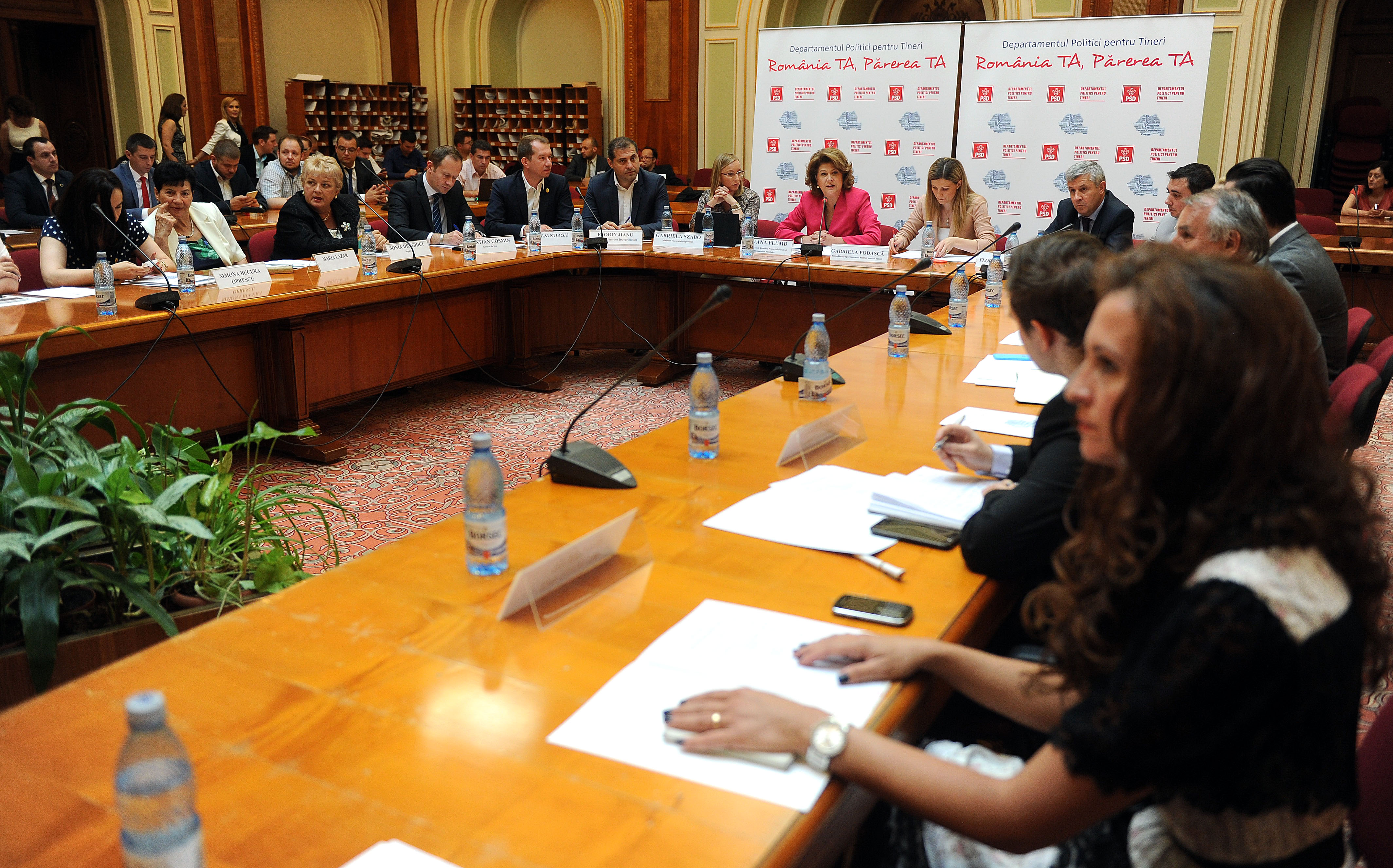 Florin Jianu, Maria Lazăr, Sonia-Maria Drăghici, Simona Bucura-Oprescu la dezbaterea "Romania TA, Parerea TA"